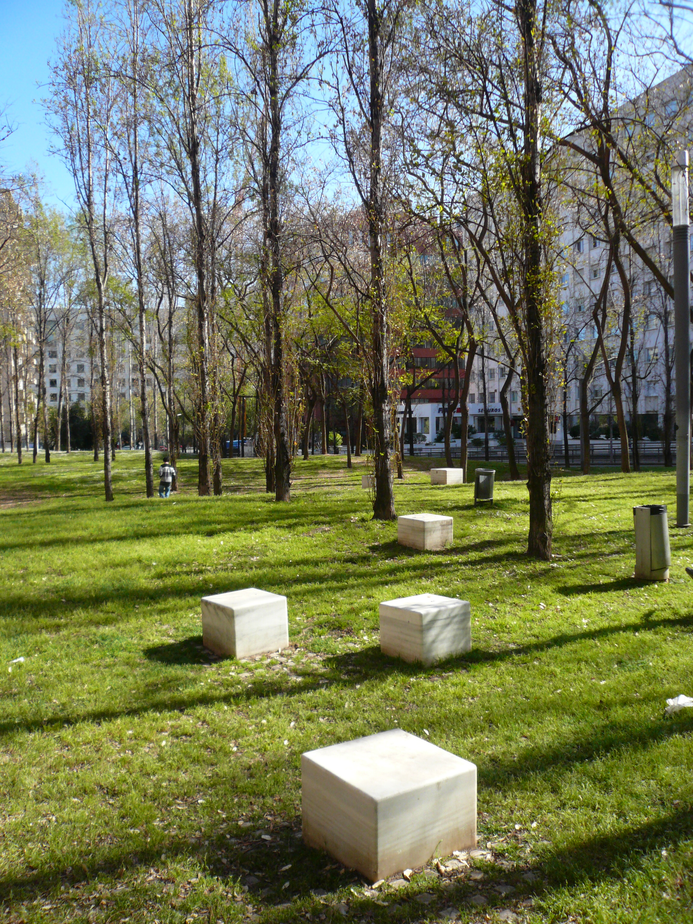 Jardins d'Olga Sacharoff. Jardins d'Olga Sacharoff (Barcelona). Paisatge: Marta Gabàs, Carles Casamor. Material: marbre blanc sobre paisatge. 1994. 46″ N, 2° 08′ 00.6″ E